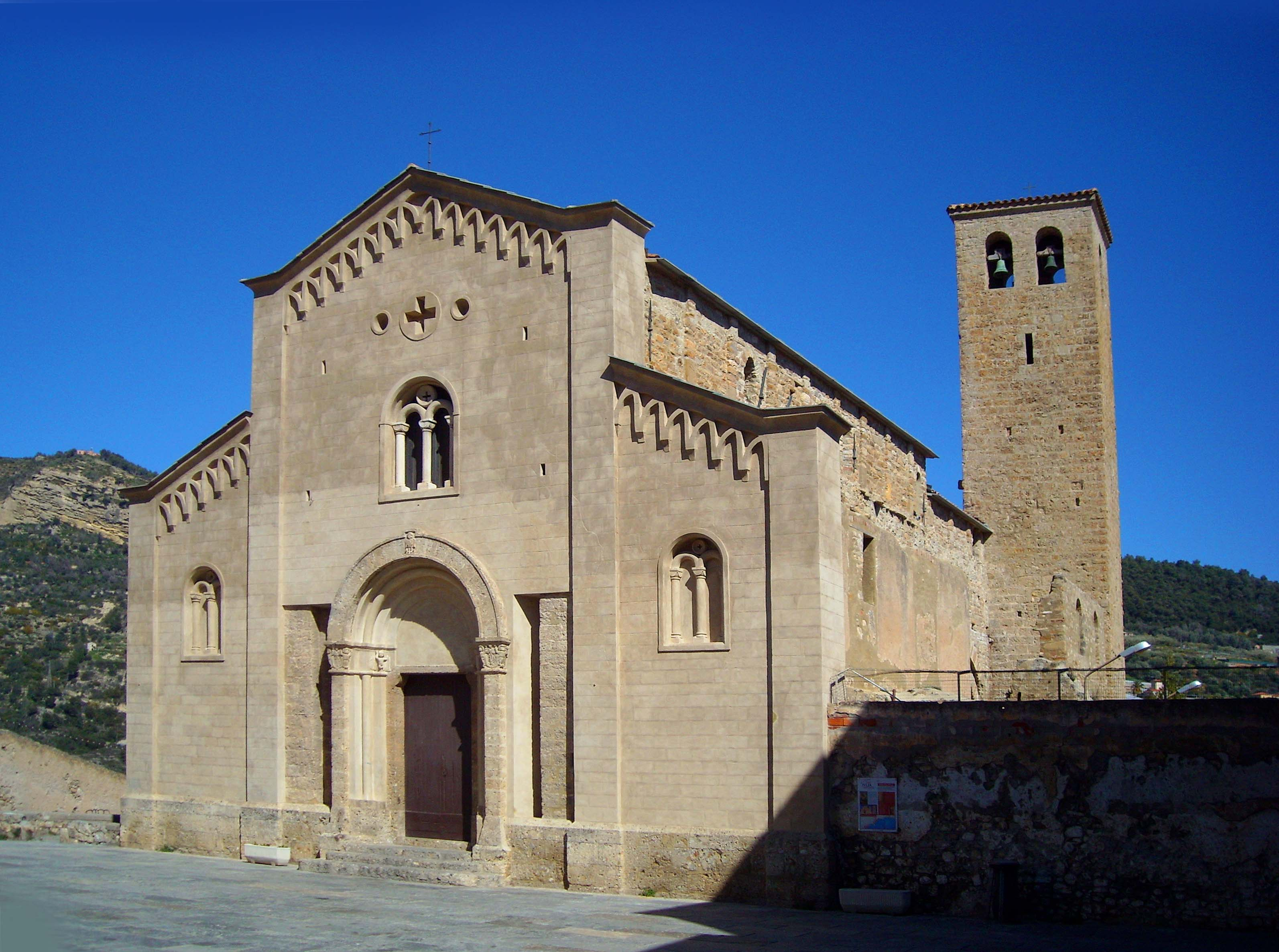 La chiesa San Michele a Ventimiglia alta costruita nell'XI secolo con la facciata in stile romanico ricostruito alla fine dell'ottocento.